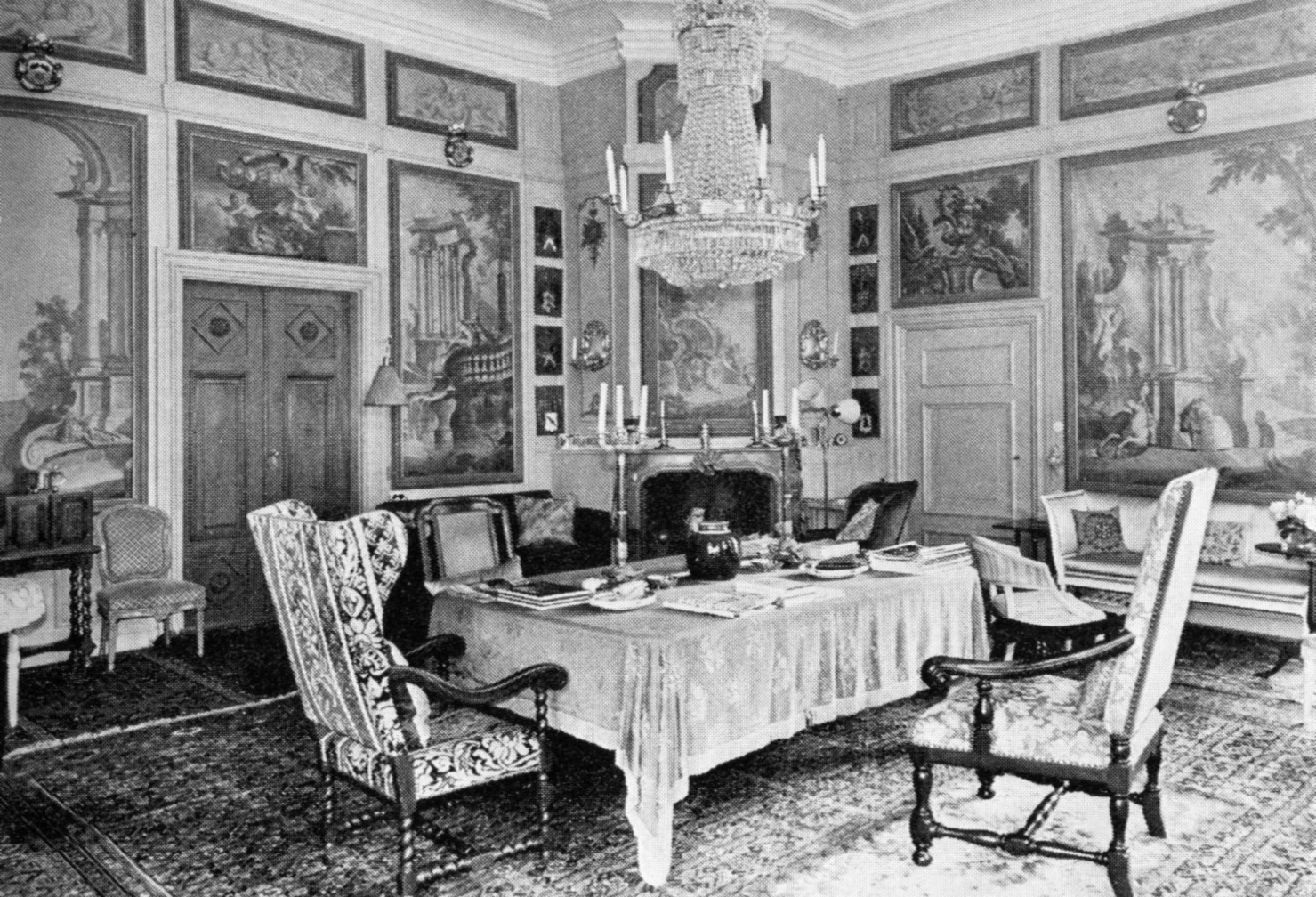 Edeby gård Ripsa socken, salen